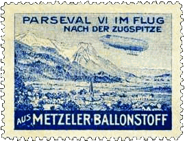 Gelegenheitsmarke Metzeler